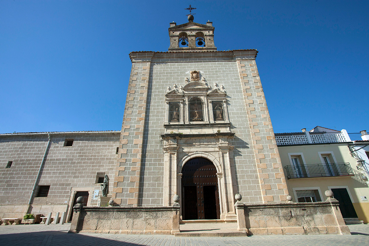 Convento monasterio Cristo de Serradilla